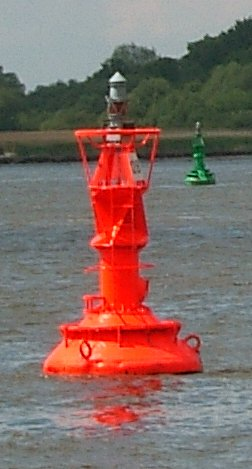 Hamburg, Rissen, Falkensteiner Ufer, Schiffstonnen